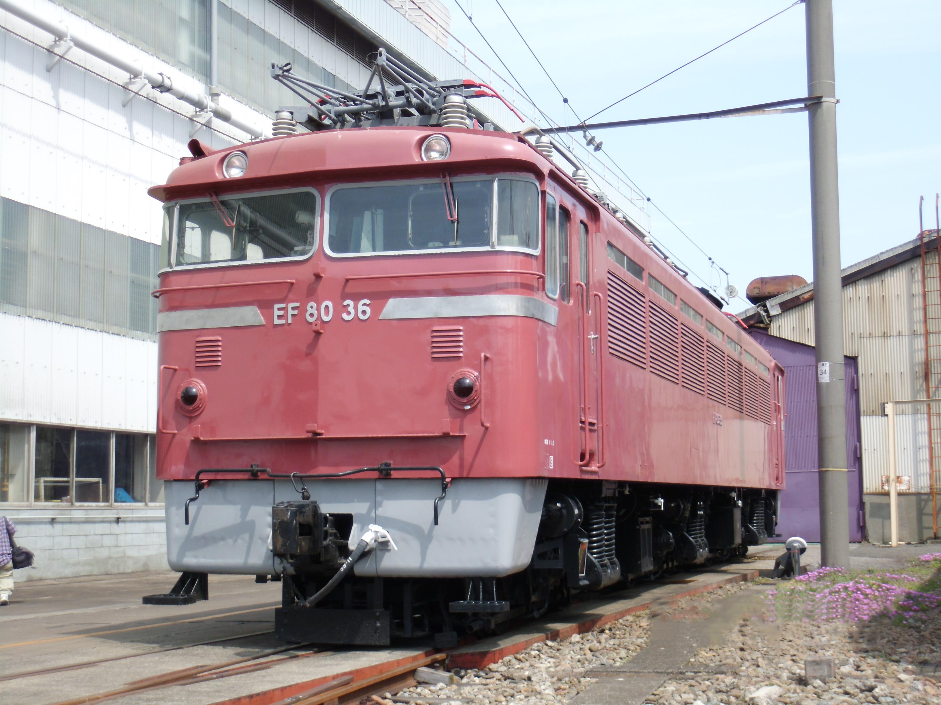 大宮総合車両センターで展示されたEF80 36－「JRおおみや 鉄道ふれあいフェア2012」にて